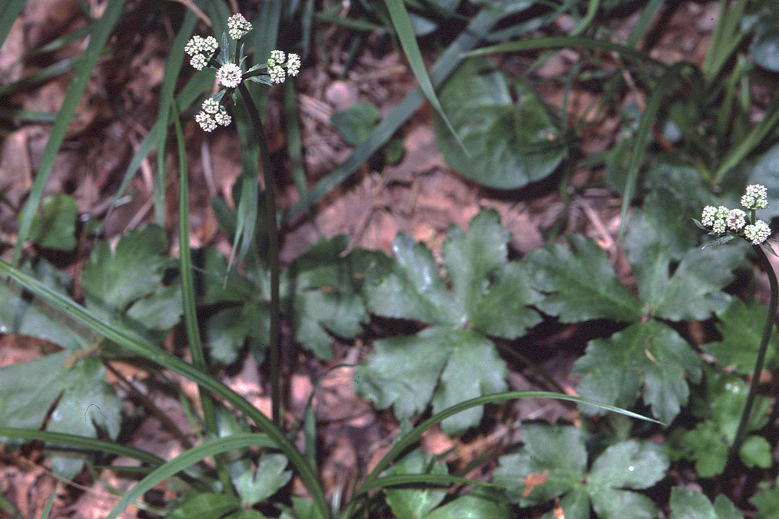 Sanicula europaea